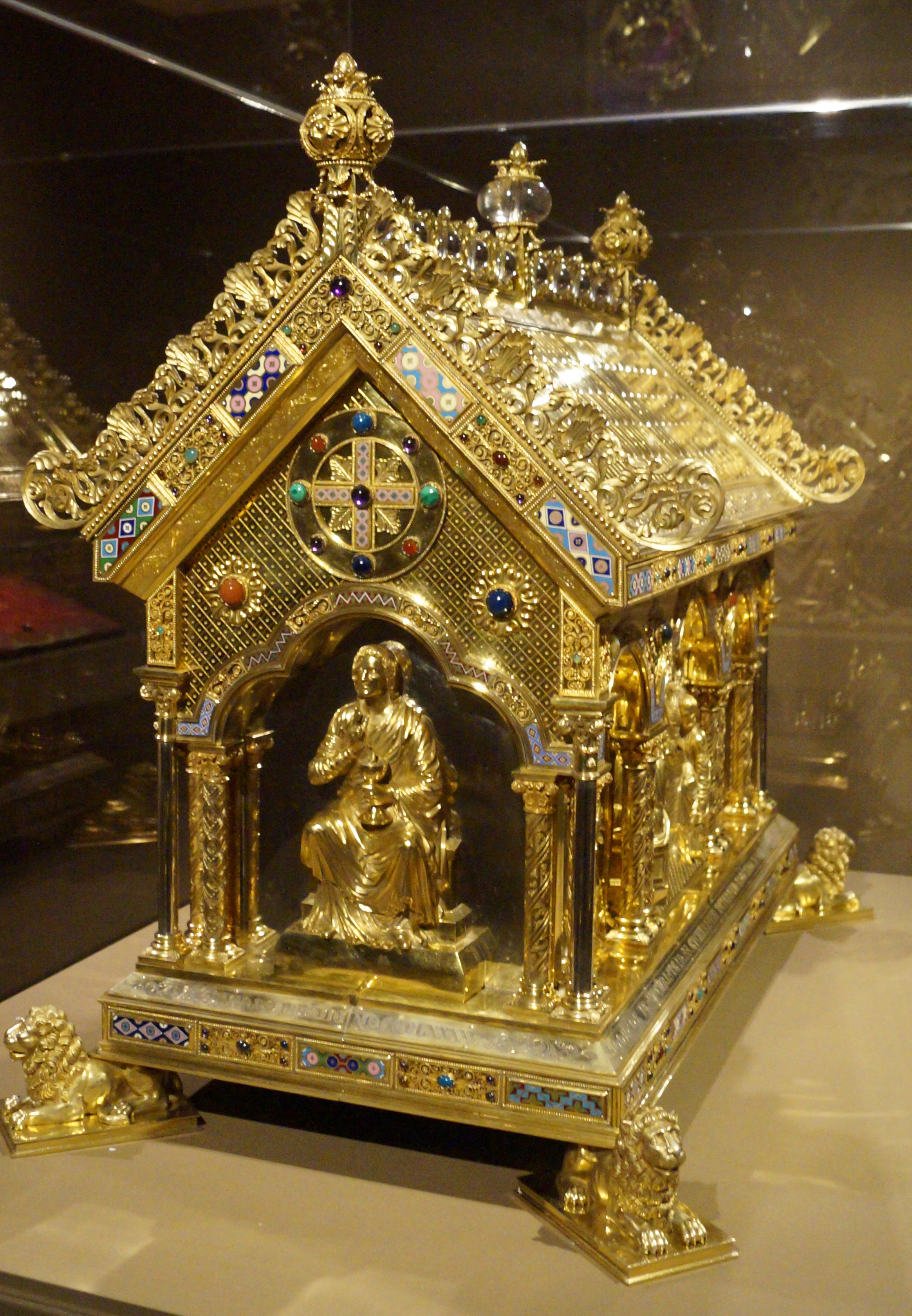 Abendmahlsschrein von 1895 im Münster MG (2014)